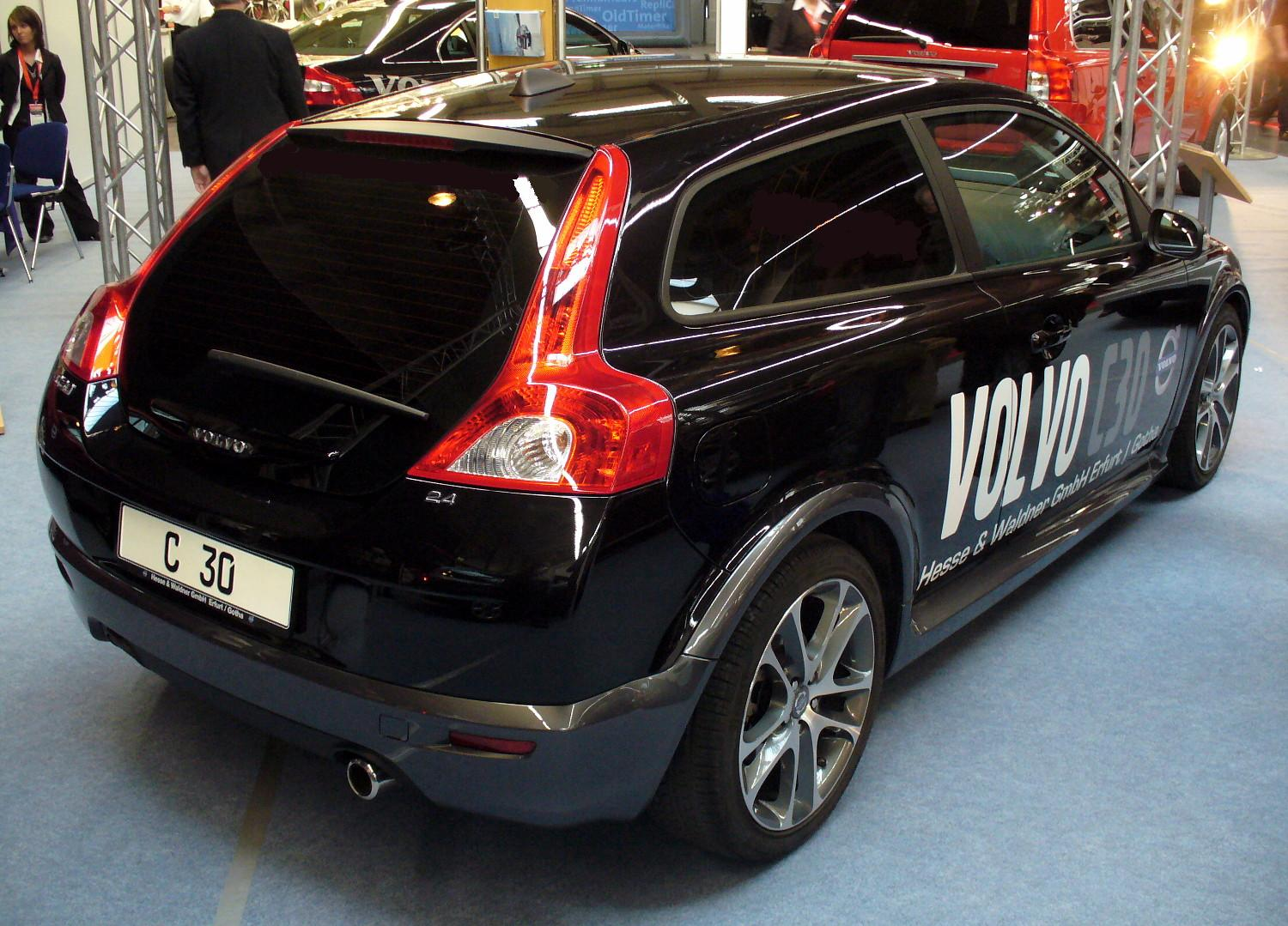 Volvo C30